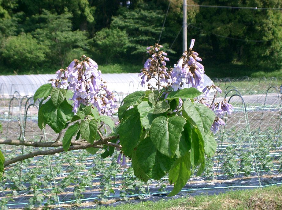 Paulownia tomentosa